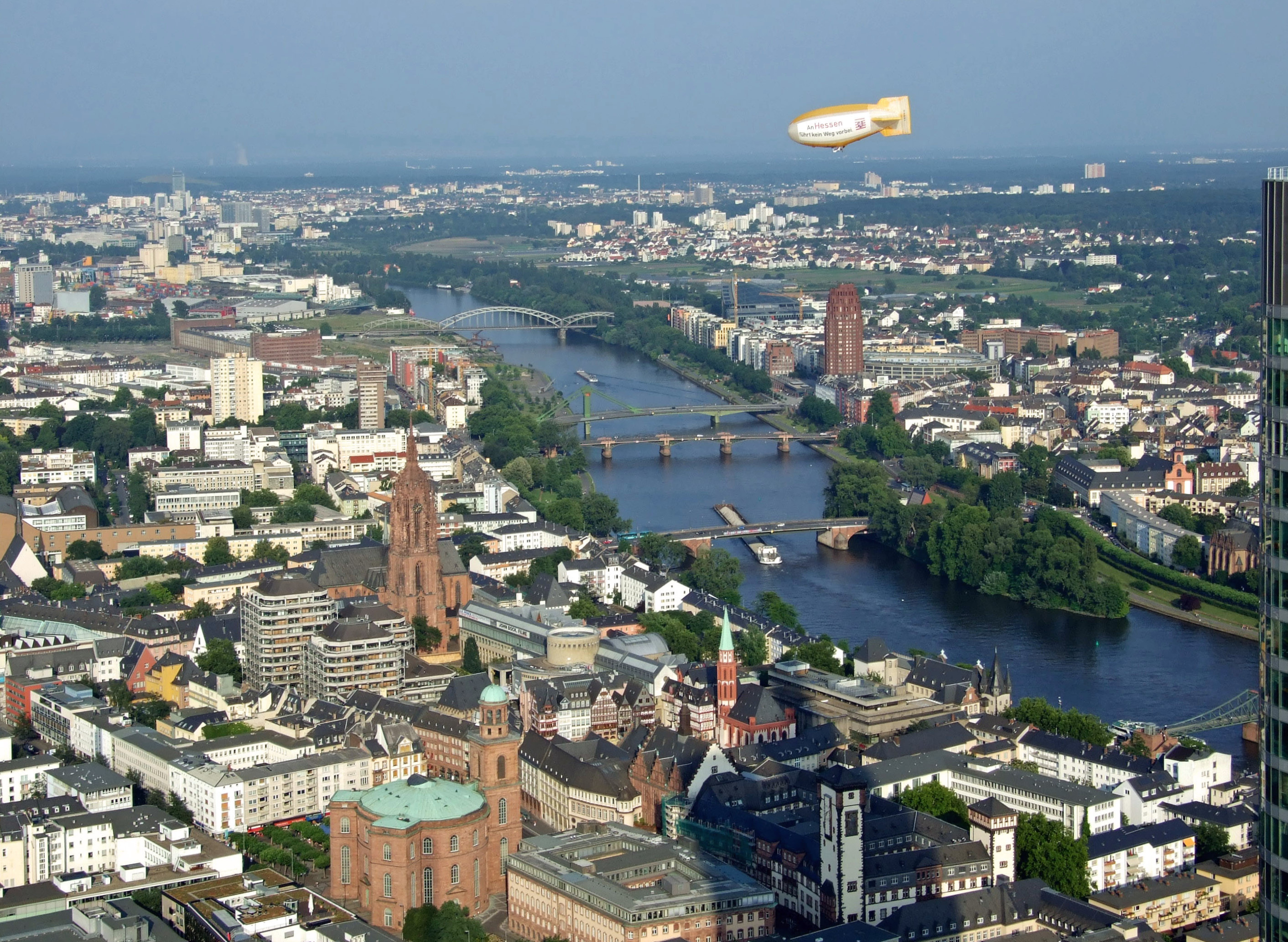 Der Main von der Deutschherrnbruecke bis zur Alten Bruecke. Mit Offenbach und Oberrad im Hintergrund